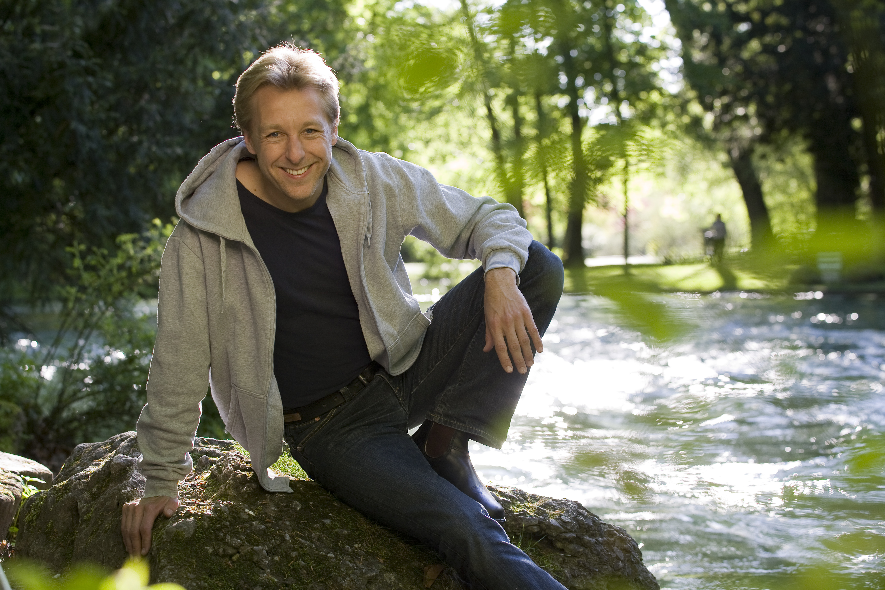 Portrait des Schauspielers Max Müller